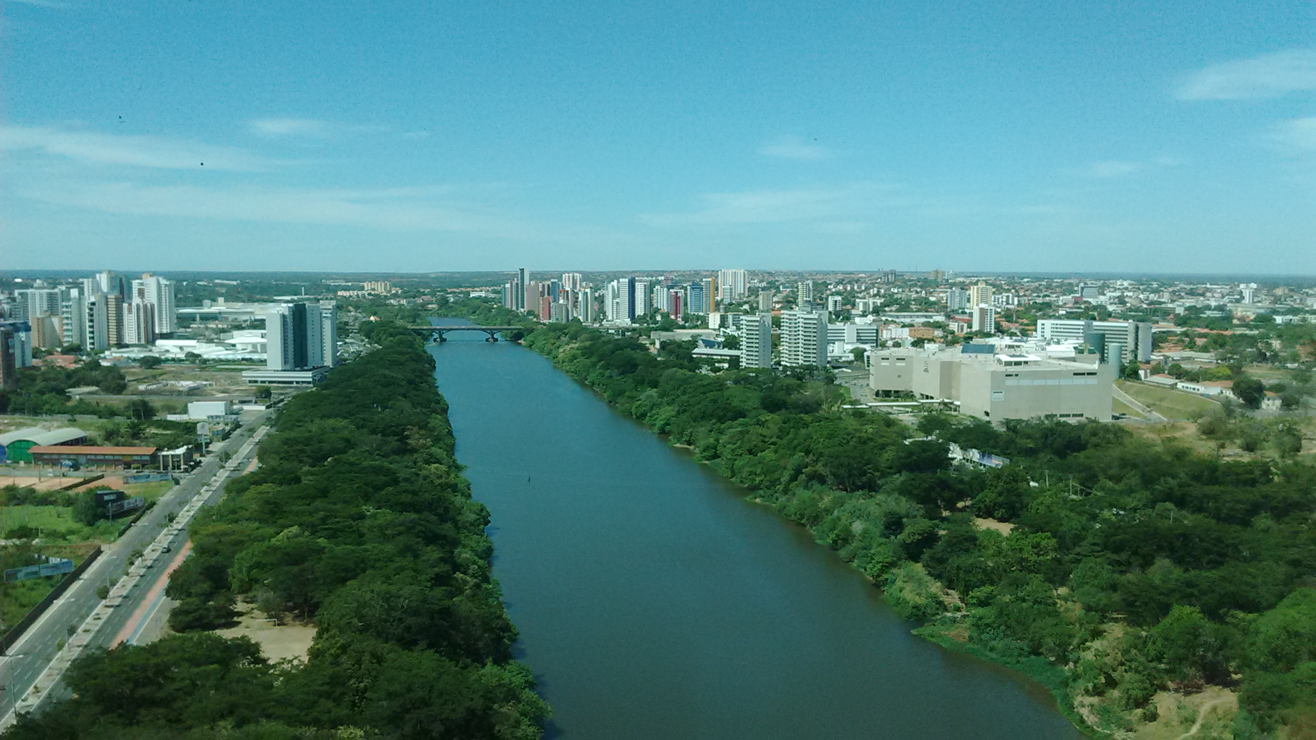 Vista do mirante da ponte estaiada sobre o rio Poti, em Teresina, Piauí, Brasil.